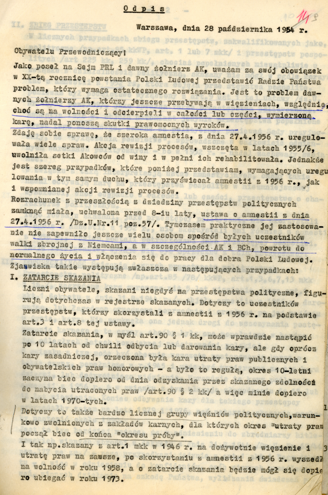 Strona 1